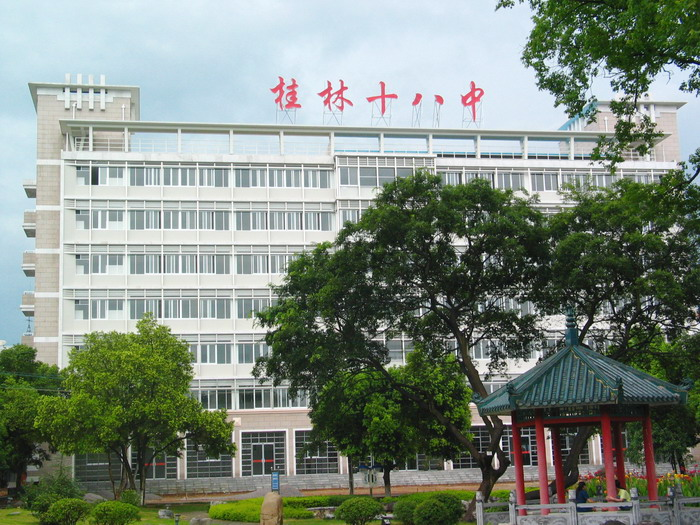 桂林市第十八中学教学楼，建有物理、化学、生物实验室与微机室。